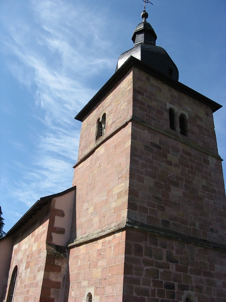 Domfaing Commune des Vosges L'église du Haut-de-Belmont Photographie personnelle, prise le 23 avril 2006 Copyright © Christian Amet